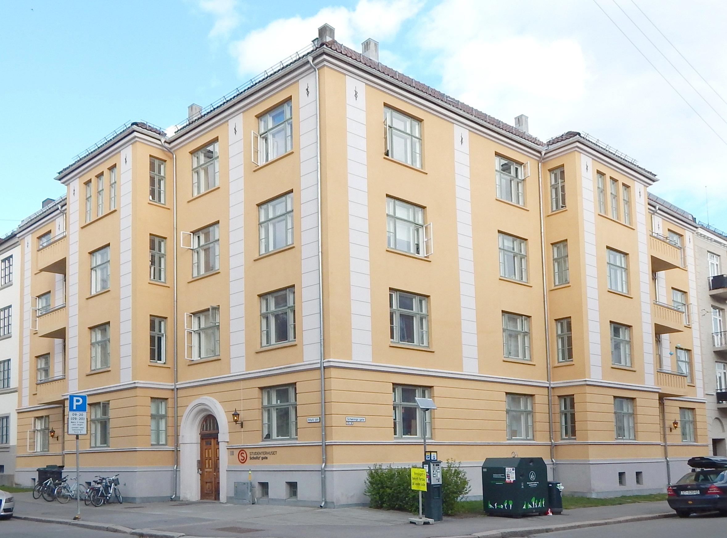 Studenterhuset i Schultz’ gate 29 (tidl. nr. 7). Arkitekt: Georges Heinecke, oppført 1919.